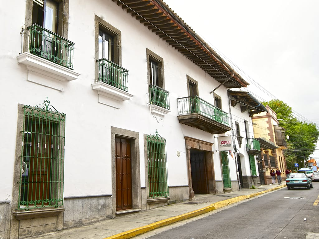 Fachada del edificio del Organismo Público Local Electoral del Estado de Veracruz